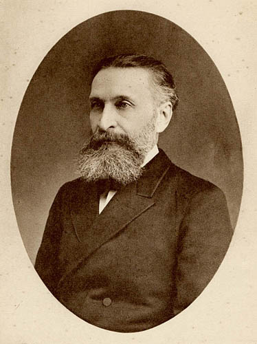 Nikolaï Alexandrovitch Manassein, 1835 - 1895.